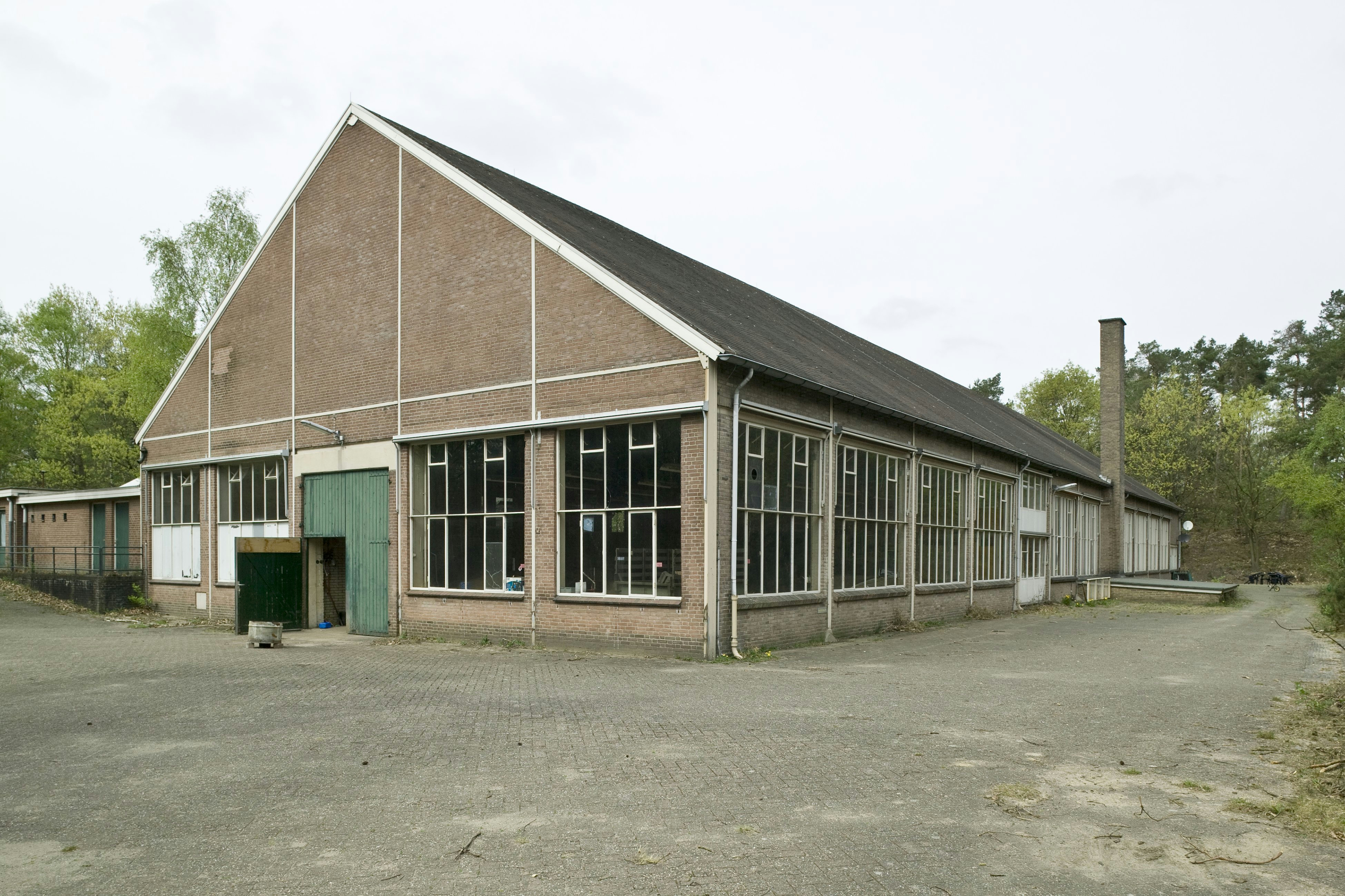 Complex Radio Kootwijk: Gebouw G, Siemenshal: linker achterzijde (opmerking: Deze opdracht gaat vooral om de bijgebouwen bij Radio Kootwijk)